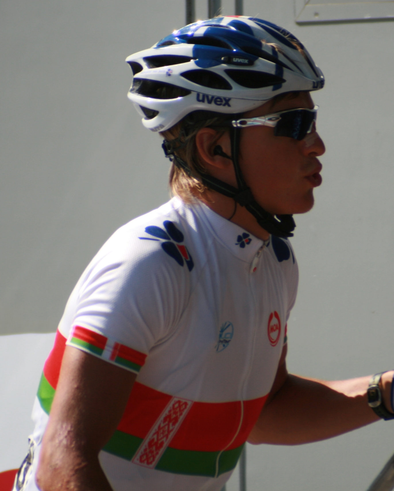 Yauheni Hutarovich à l'Eneco Tour 2008, à Ardooie